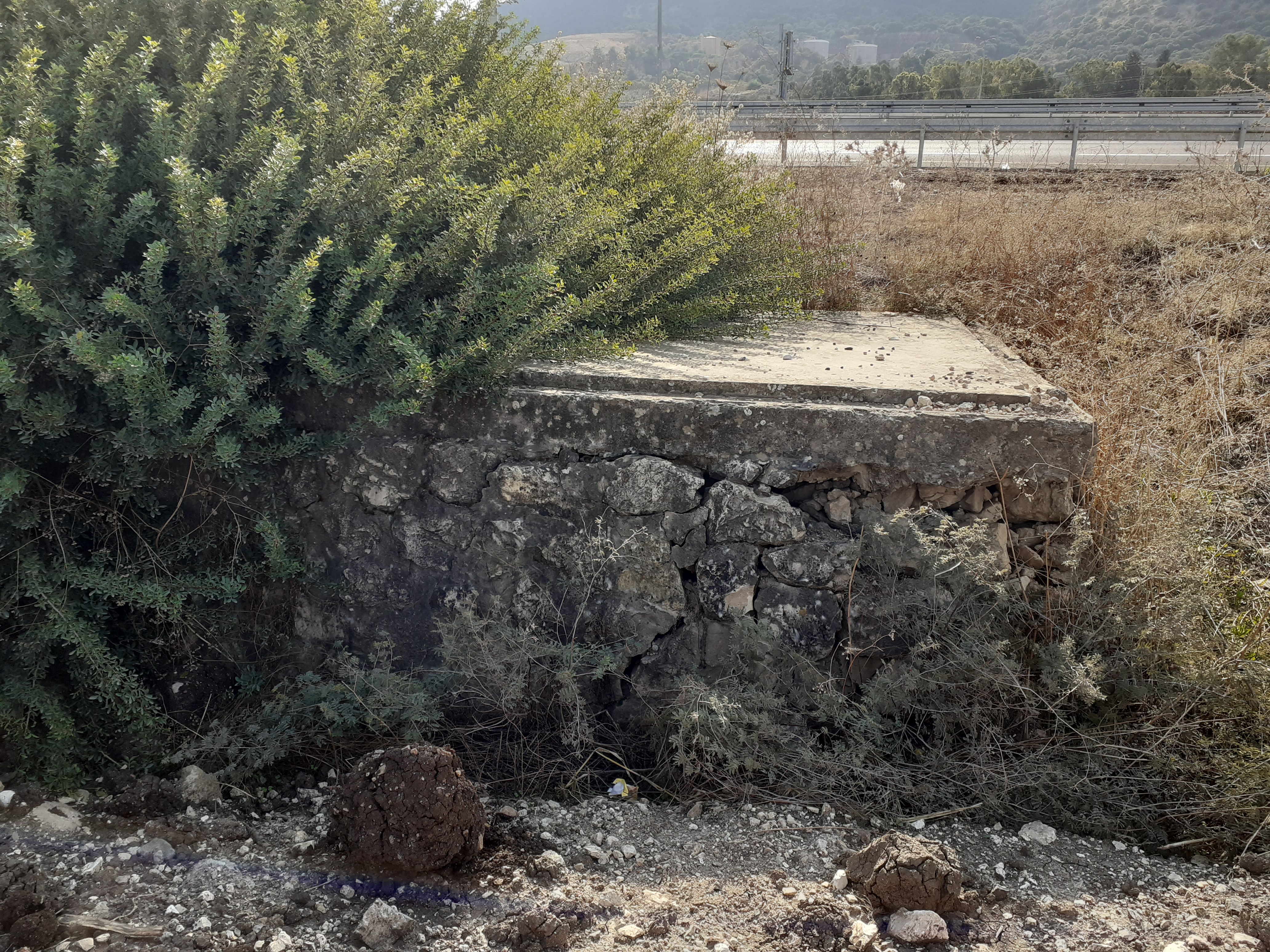 בתמונה ניתן לראות את חורבות המבנה (ככל הנראה עמדת שמירה בריטית) שנבנה בנקודת החנייה 'עין גנים' של רכבת העמק הנמצאת בסמוך לצומת העמקים